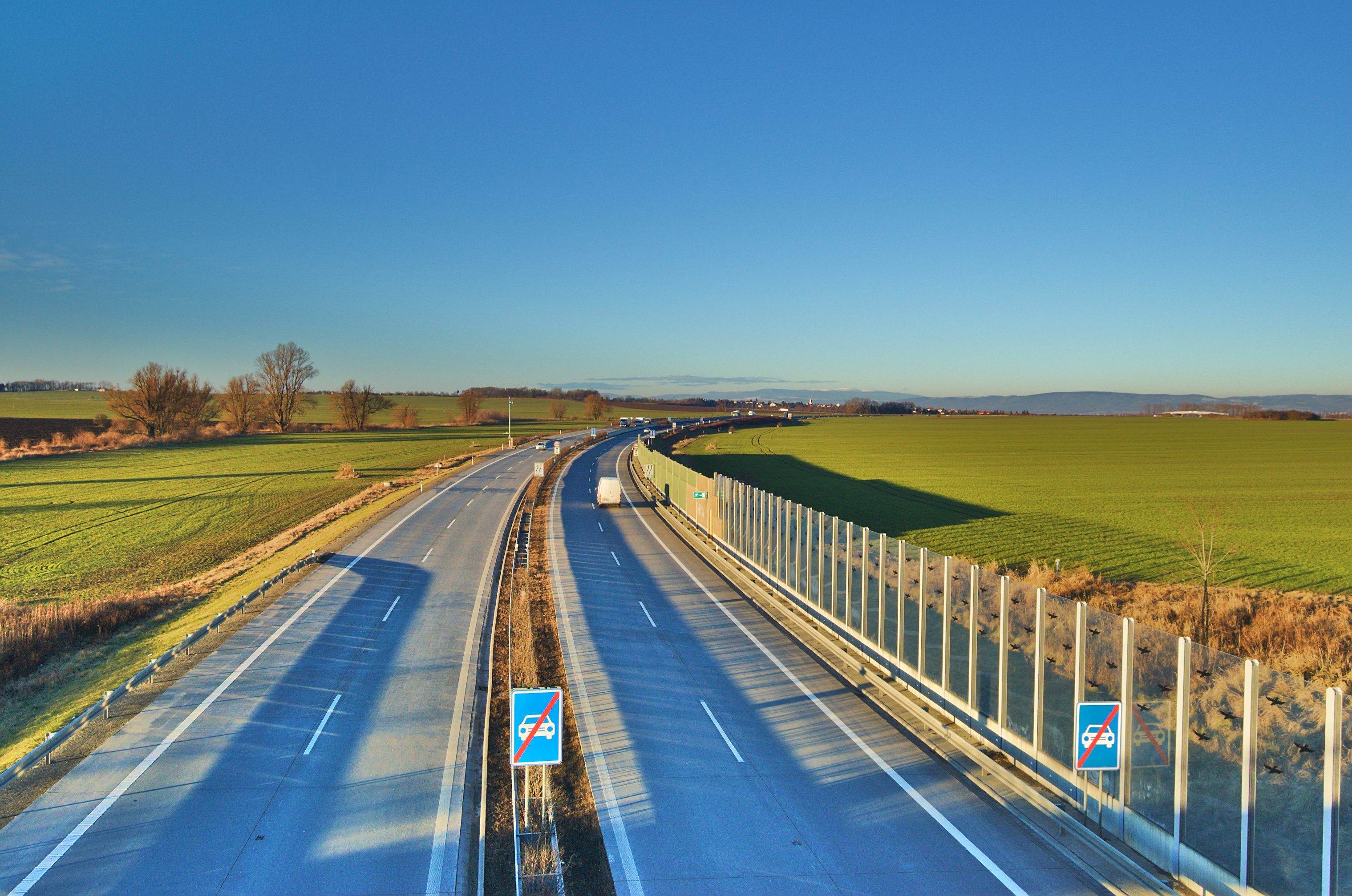 Rychlostní komunikace R35 na obchvatu Olomouce blízko letiště, Olomouc